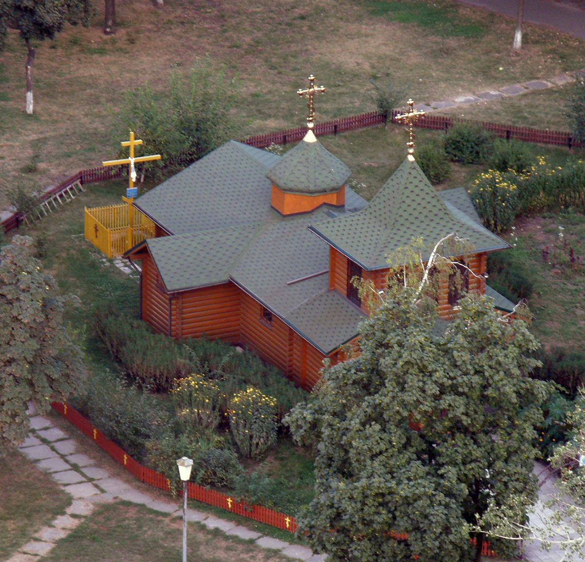 церковь Екатерины на Новой Дарнице